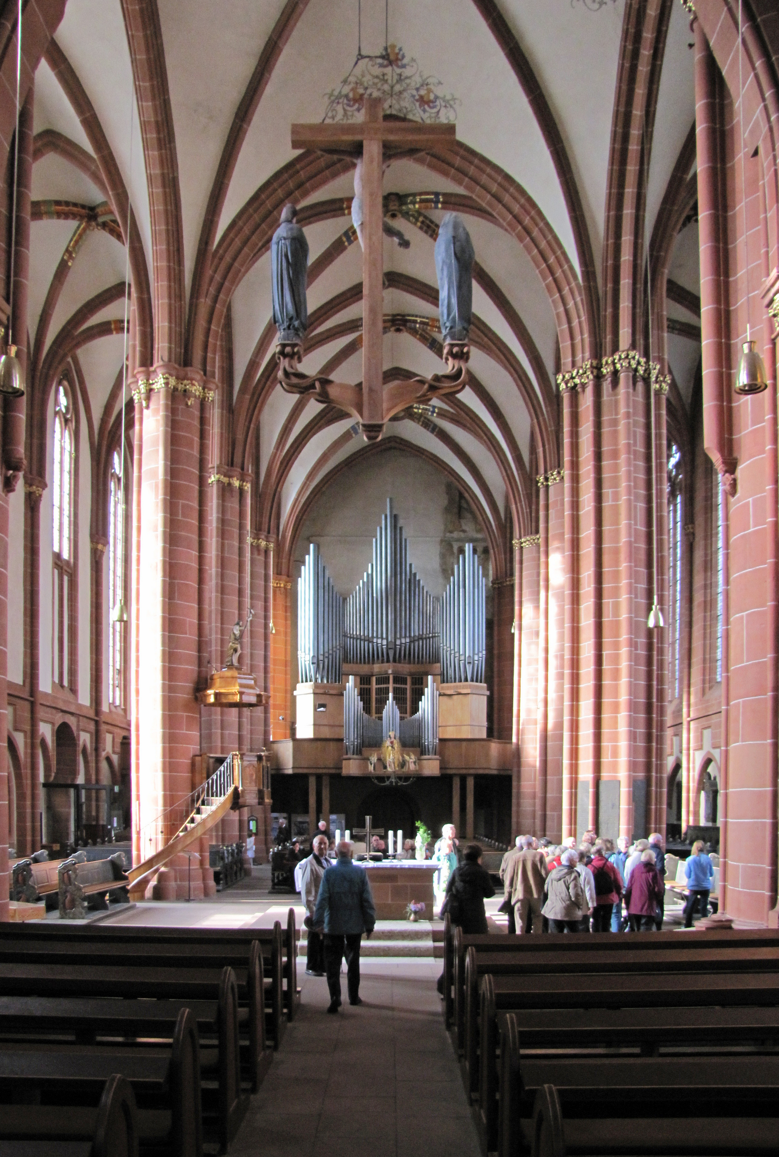 Der evangelische Altar und die Orgel im Wetzlarer Dom.